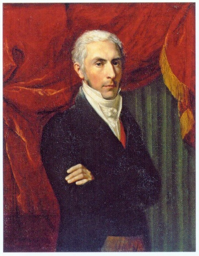 Александр Николаевич Салтыков (1775-1837), министр иностранных дел (и.о.)